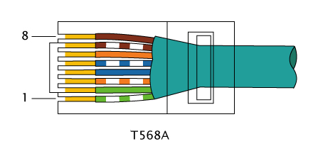 Schema connettore RJ-45 - Cablaggio EIA/TIA-568A - Orientamento sx - Elaborazione personale